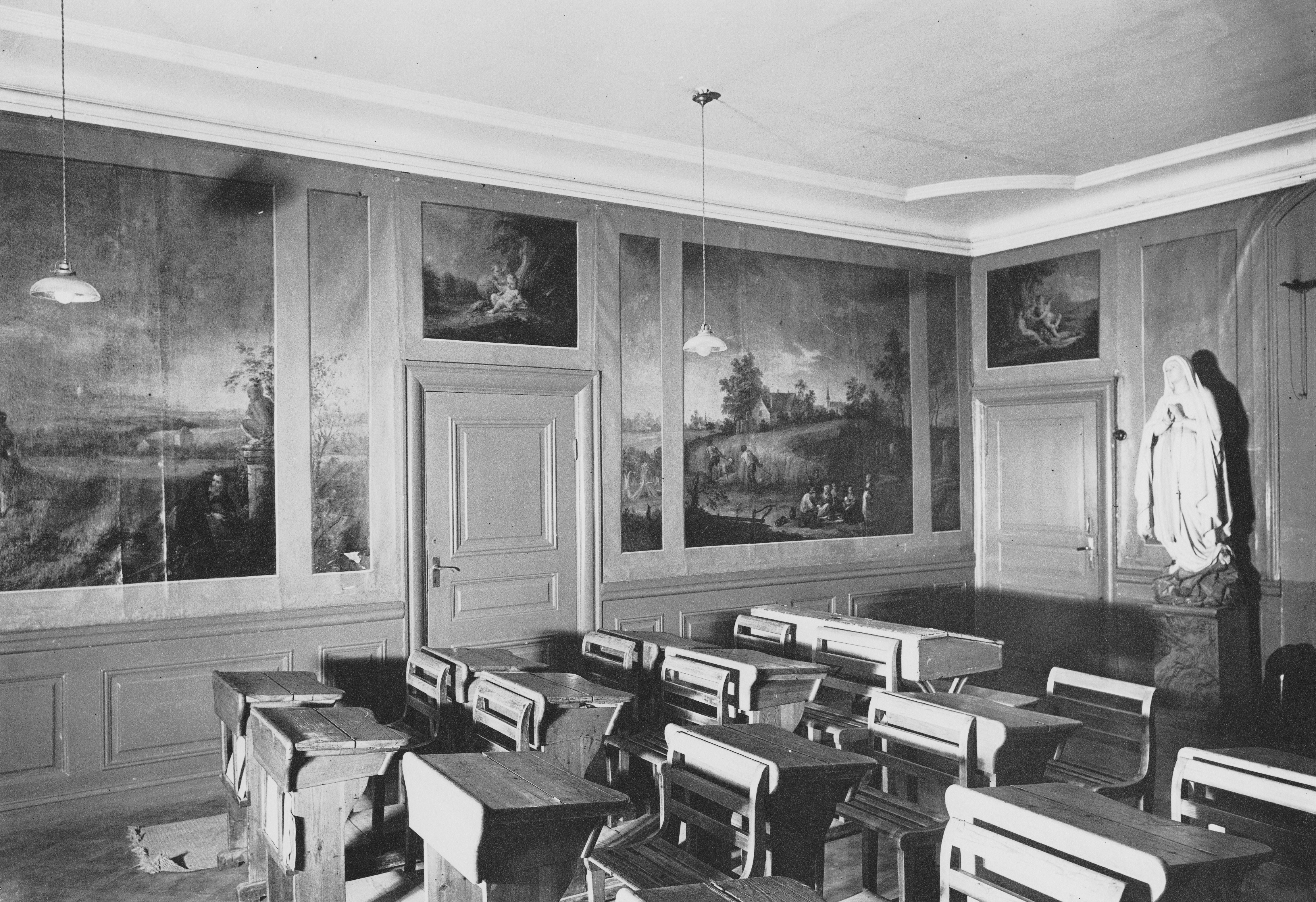 Paulis malmgård lektionssal för katolska kyrkan